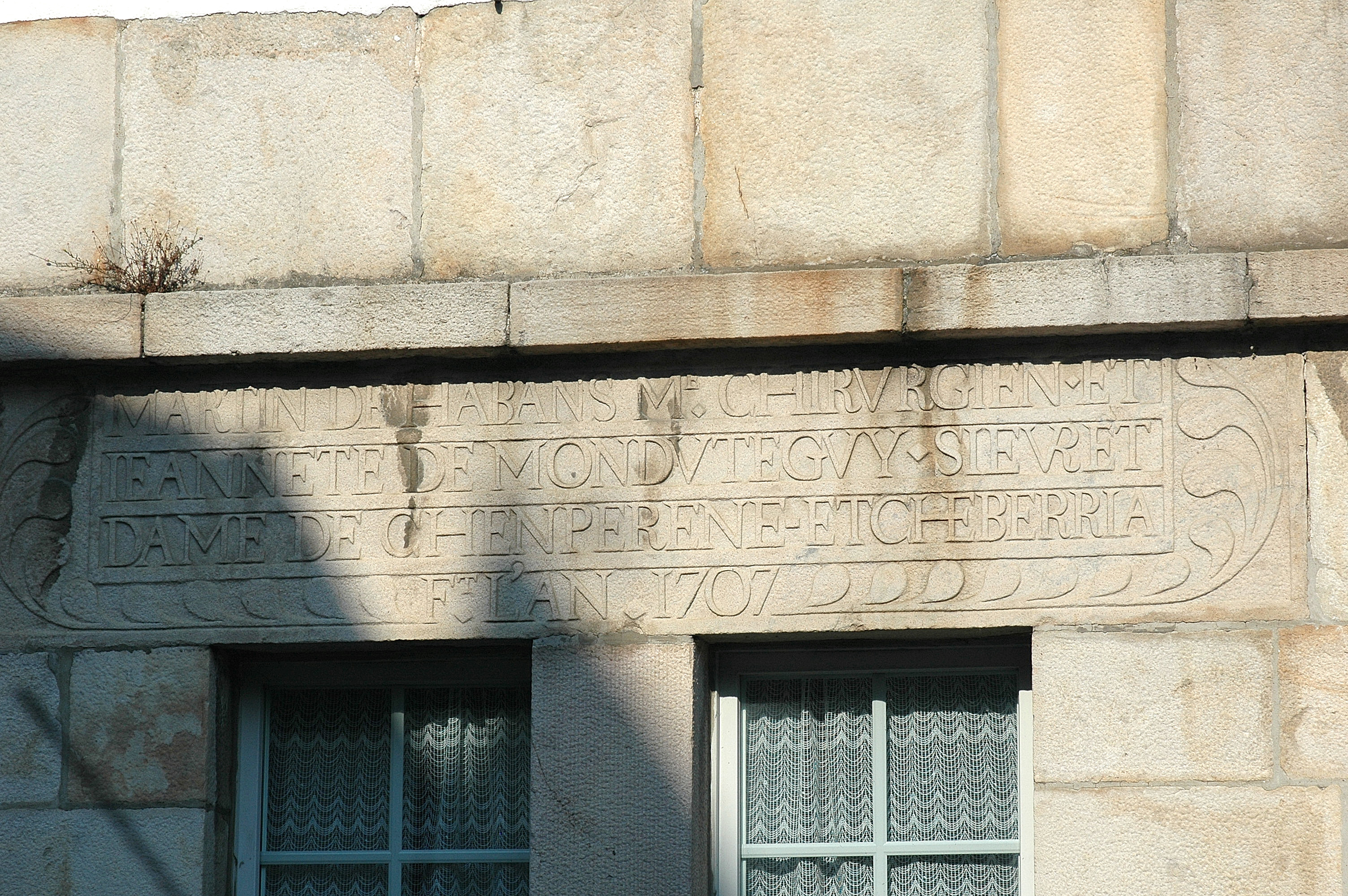 Saint-Pée-sur-Nivelle, linteau de pierre. Photo prise le 08/07/06 par Harrieta171